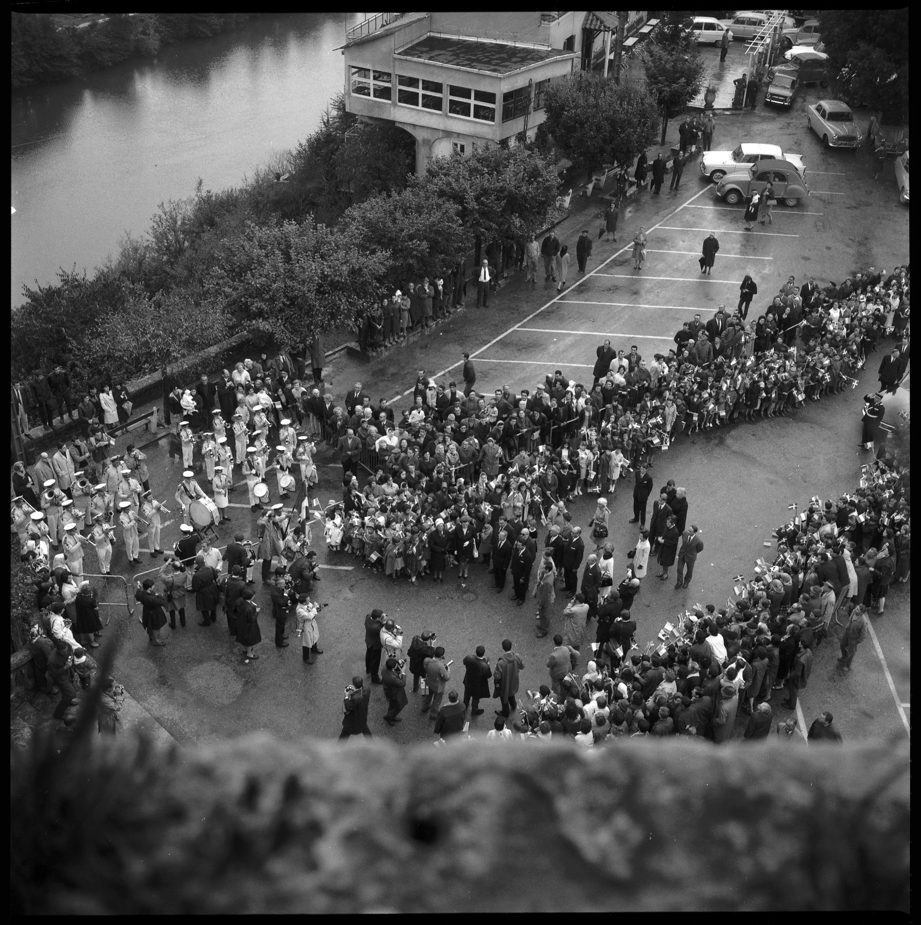 Pas de lieu. 12-16 Octobre 1966. Vue du couple princier du Danemark lors d'une réception officielle en extérieur.